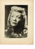 Nydia Lamarque, circa 1940